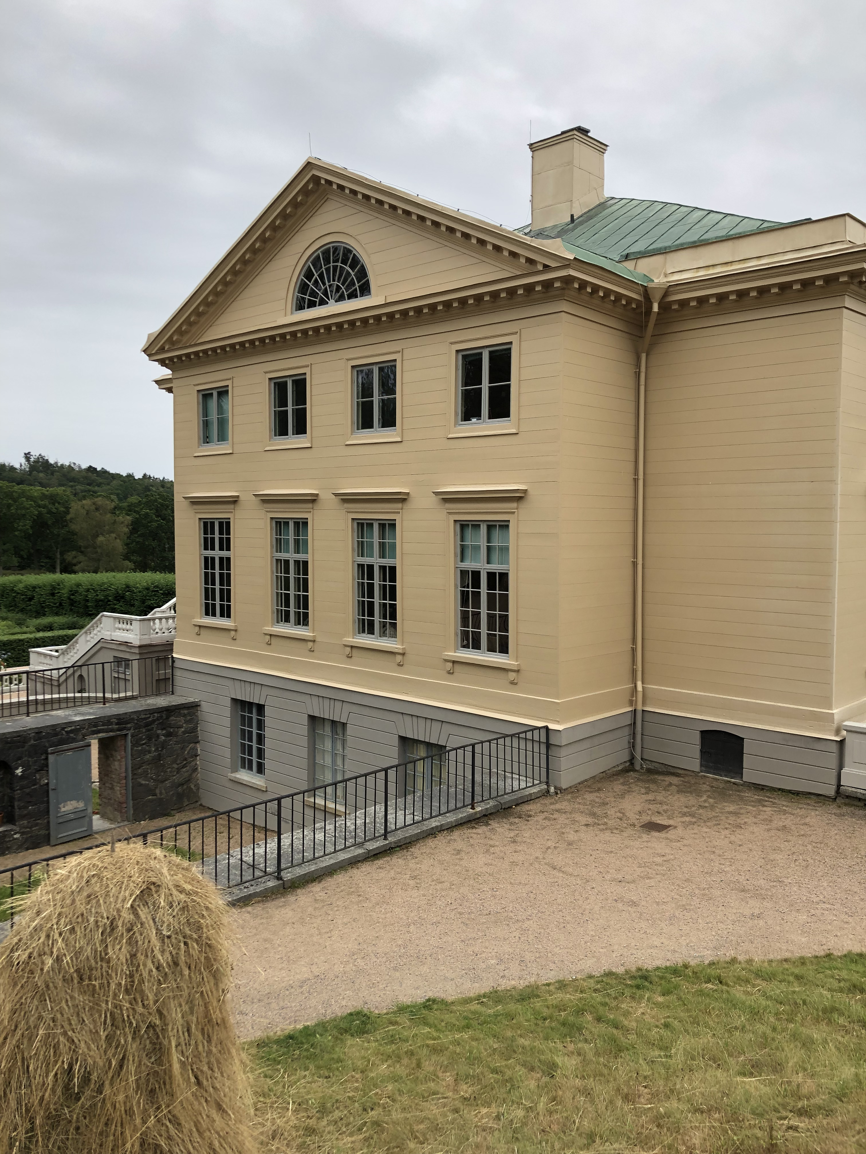 Östra fasaden av Gunnebo slott, bild tagen den 31 juli 2019.